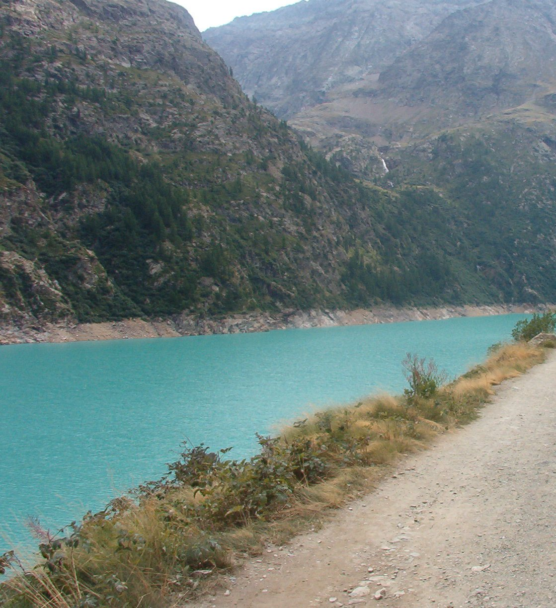 Lago Place-Moulin - ValPelline - Valle d'Aosta - Italia